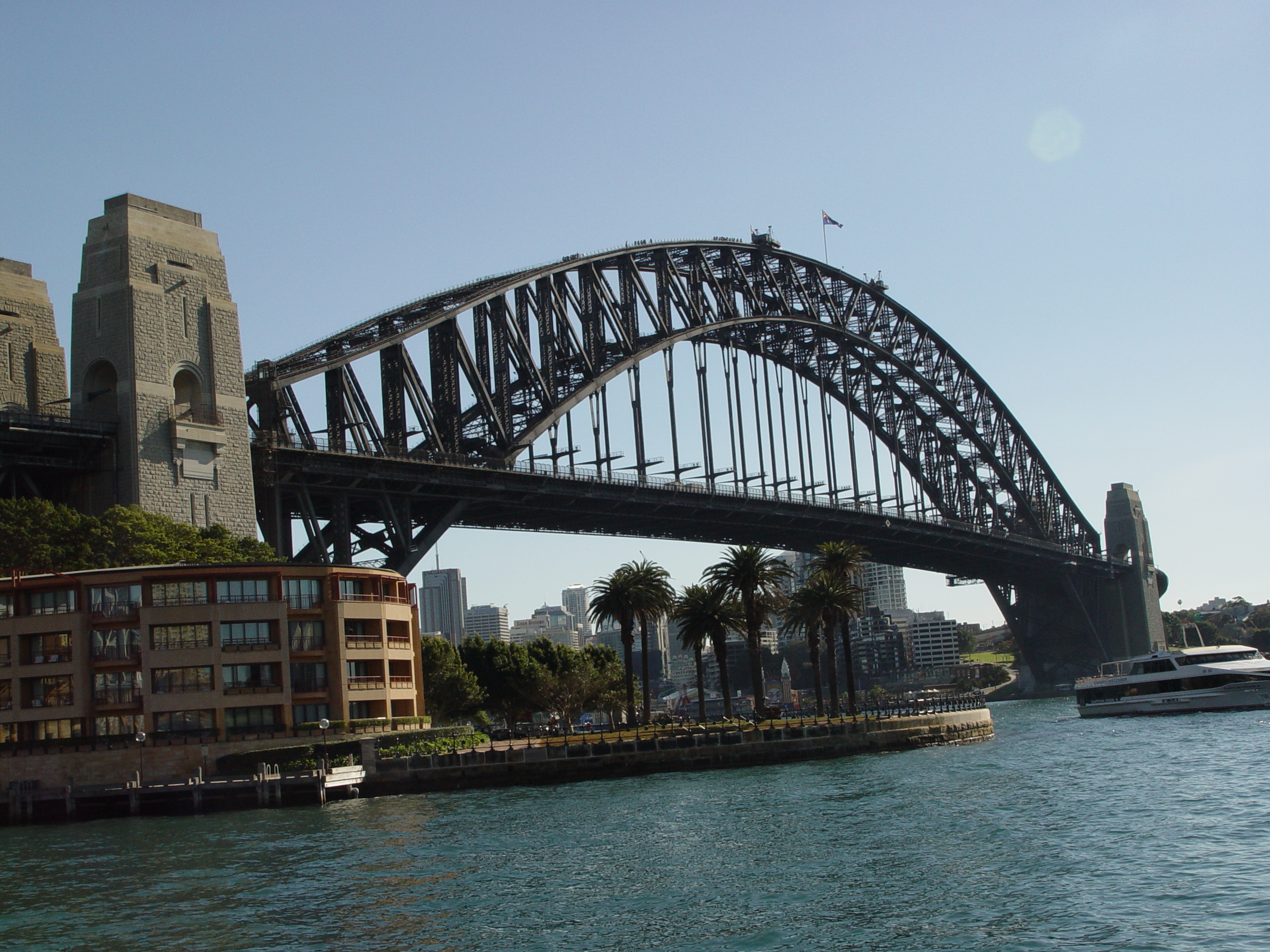 Joseolgon